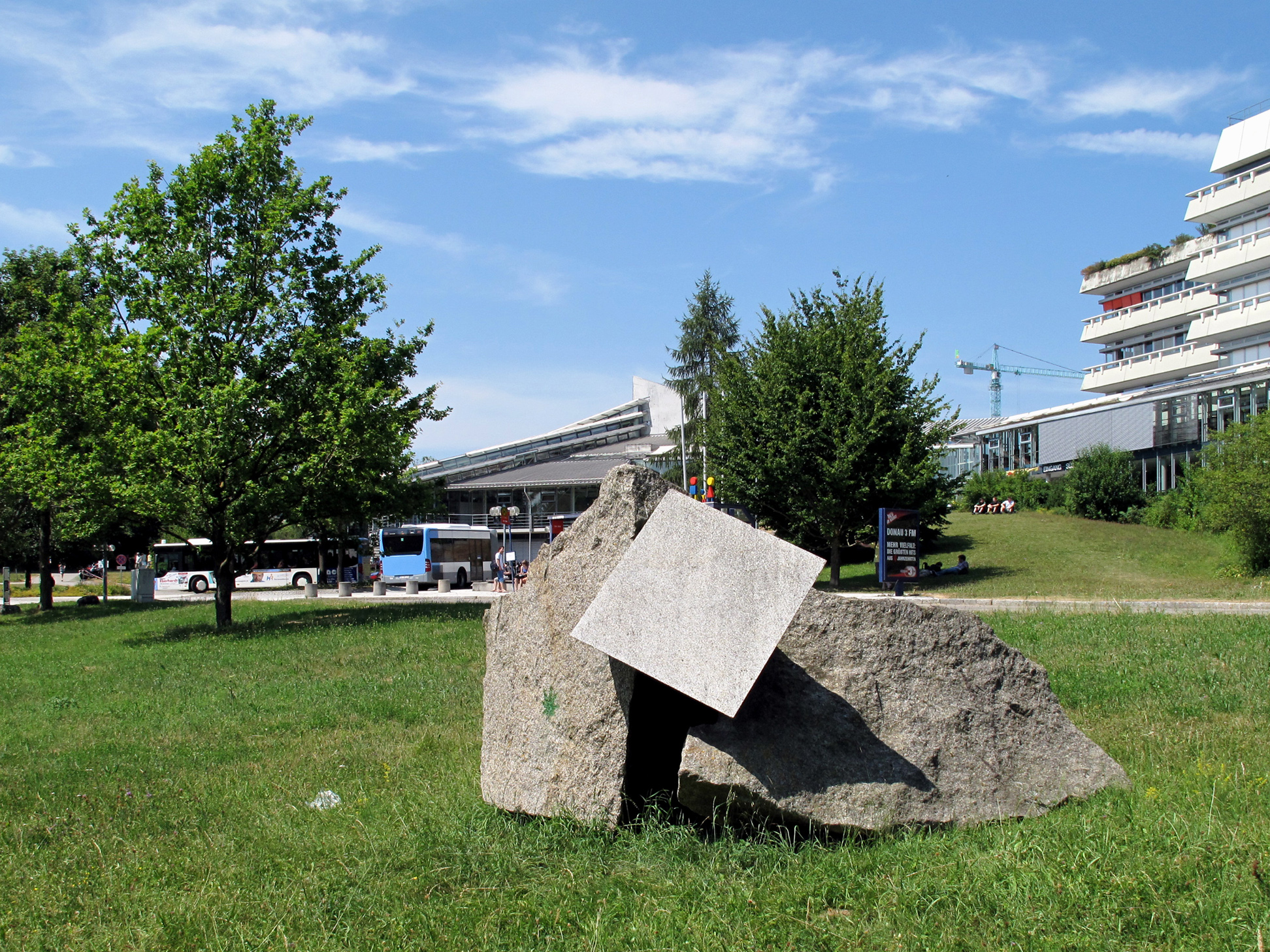 Rolf Bodenseh, Ulmer Spitze, 1990, - Kunstpfad Universität Ulm, Deutschland, Baden-Württemberg